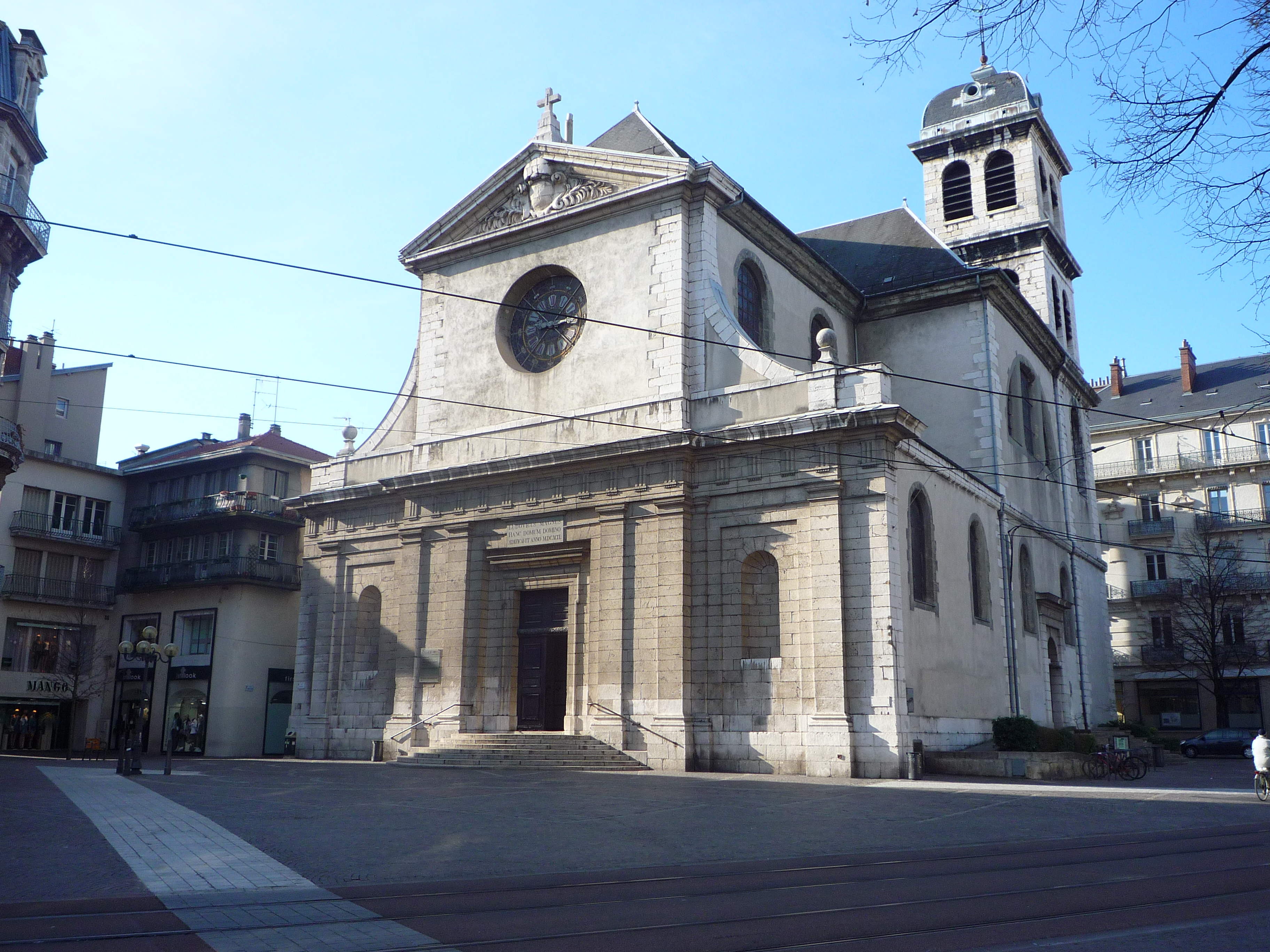 Église Saint Louis consacrée en 1699 - Rue Félix Poulat à Grenoble